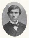 Gustav Roger Opočenský, spisovatel, novinář a písňový textař